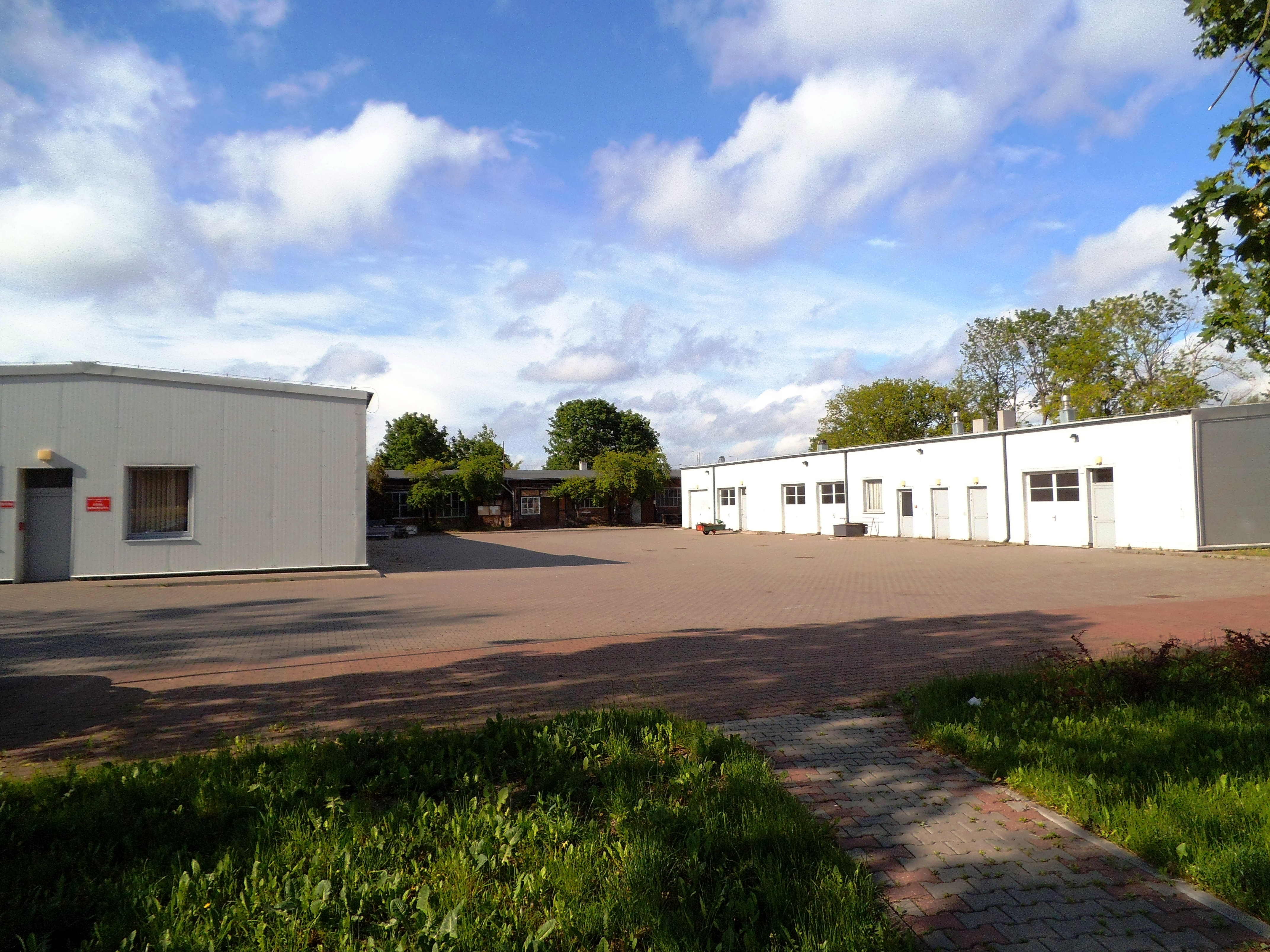 Baza Techniczno-Magazynowa UMK w Toruniu